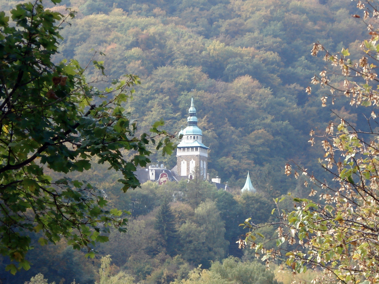 Palotaszálló (Miskolc, Miskolc-Lillafüred) This is a photo of a monument in Hungary. Identifier: 12378